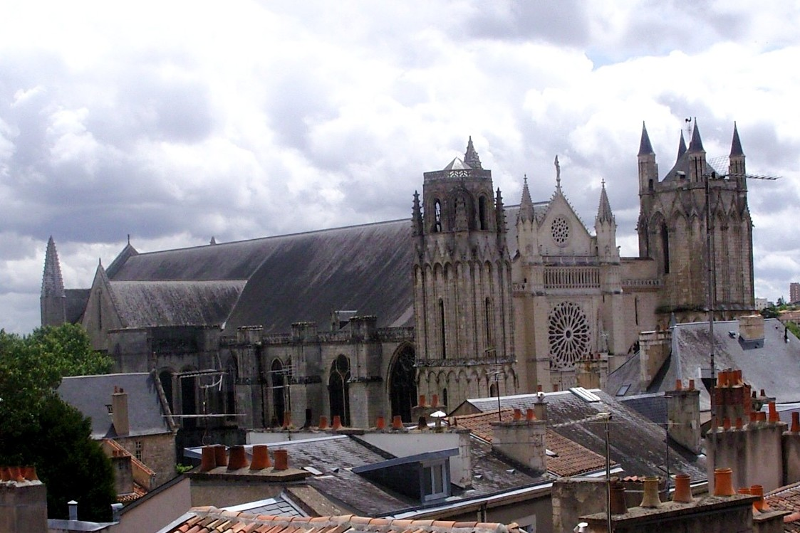 cathédrale Saint-Pierre vue de la grand'rue Poitiers